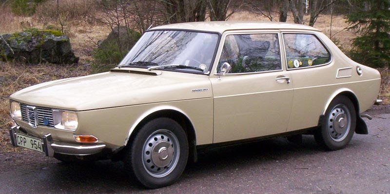 SAAB 99 2-Door Sedan 1970